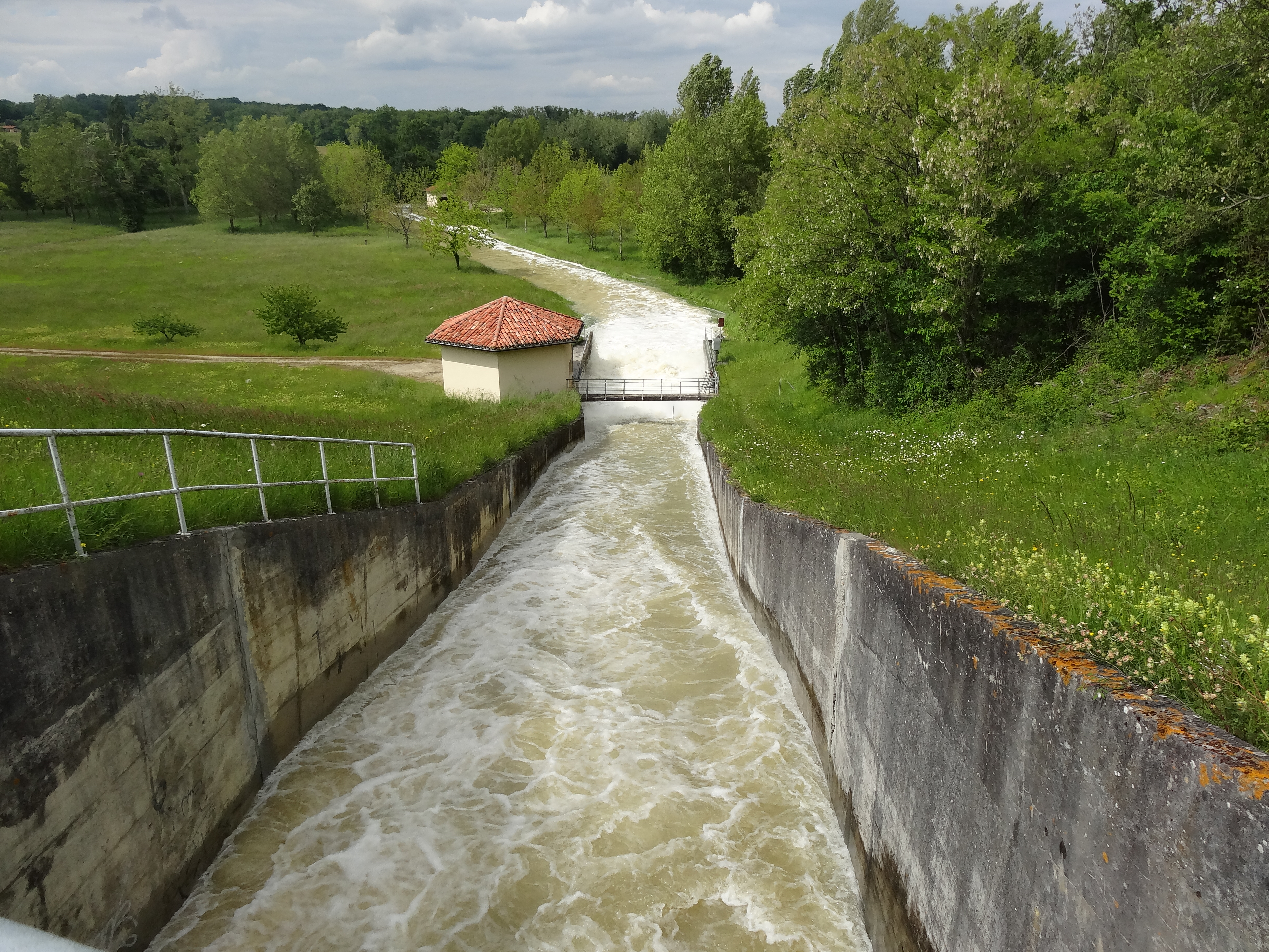 Déversoir